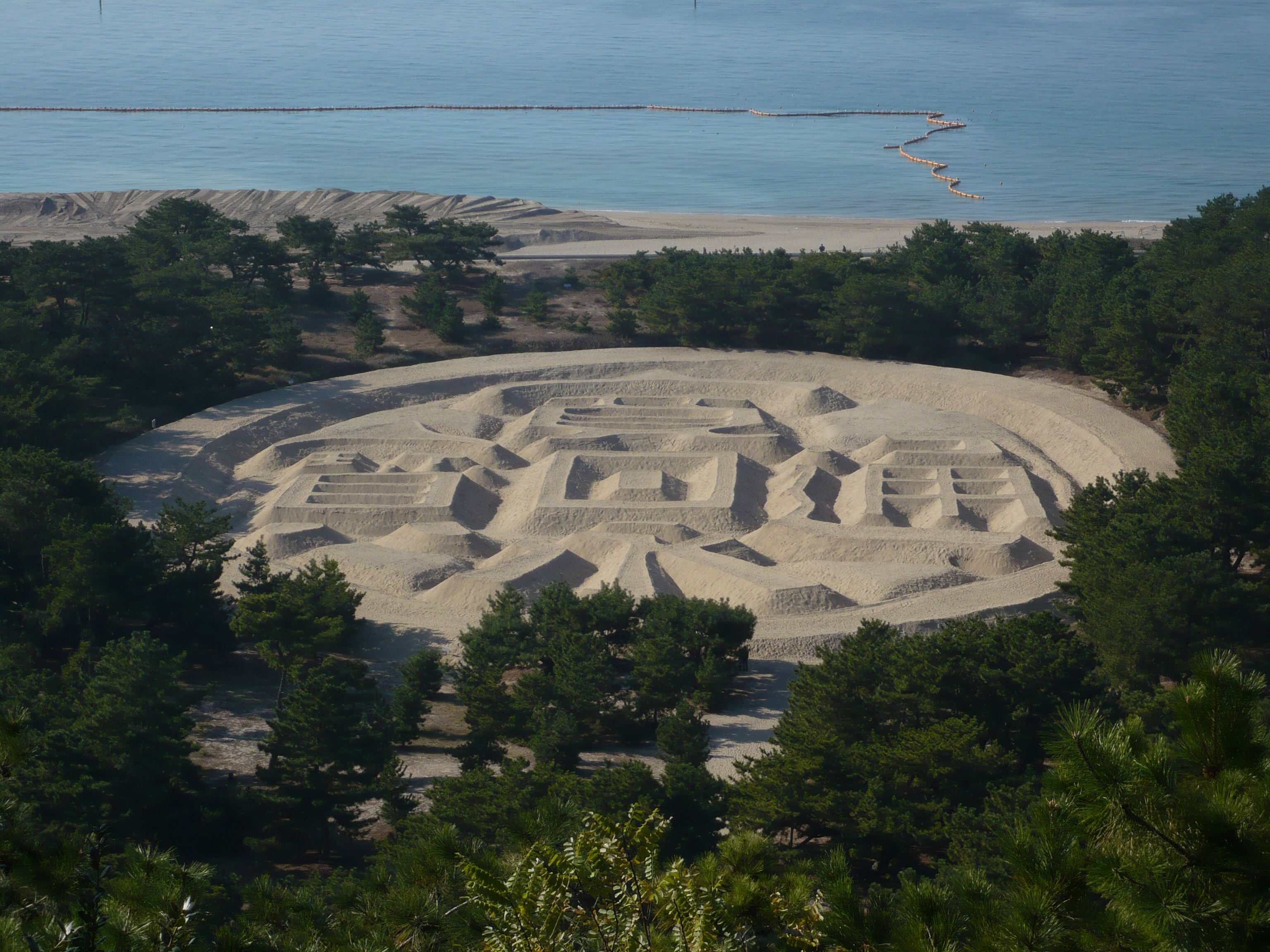 Zenigata sunae, Kan'onji, Kagawa, Japan 銭形砂絵（香川県観音寺市）